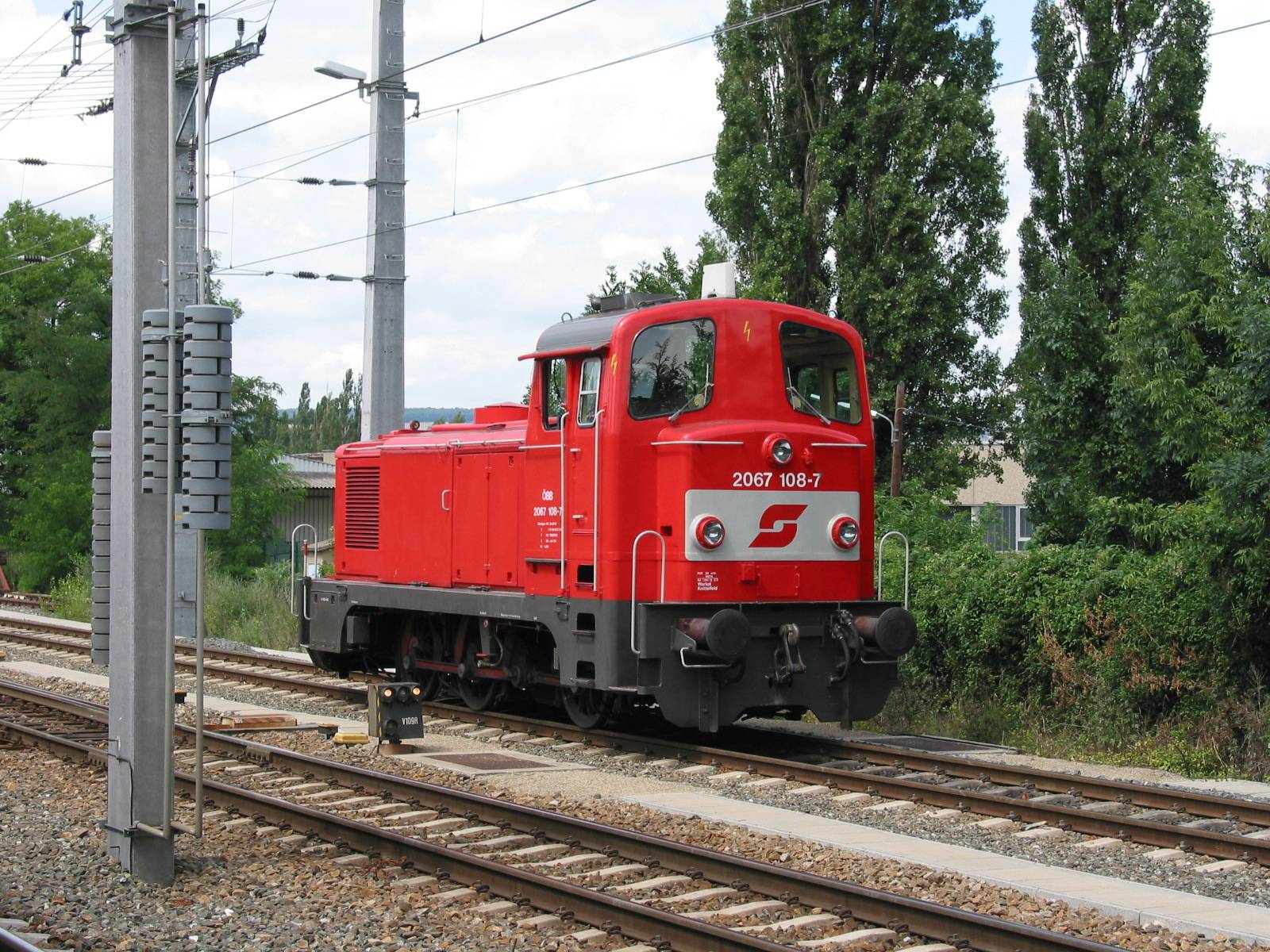 de: ÖBB 2067 108 in Jedlersdorf en: ÖBB 2067 108 in Jedlersdorf